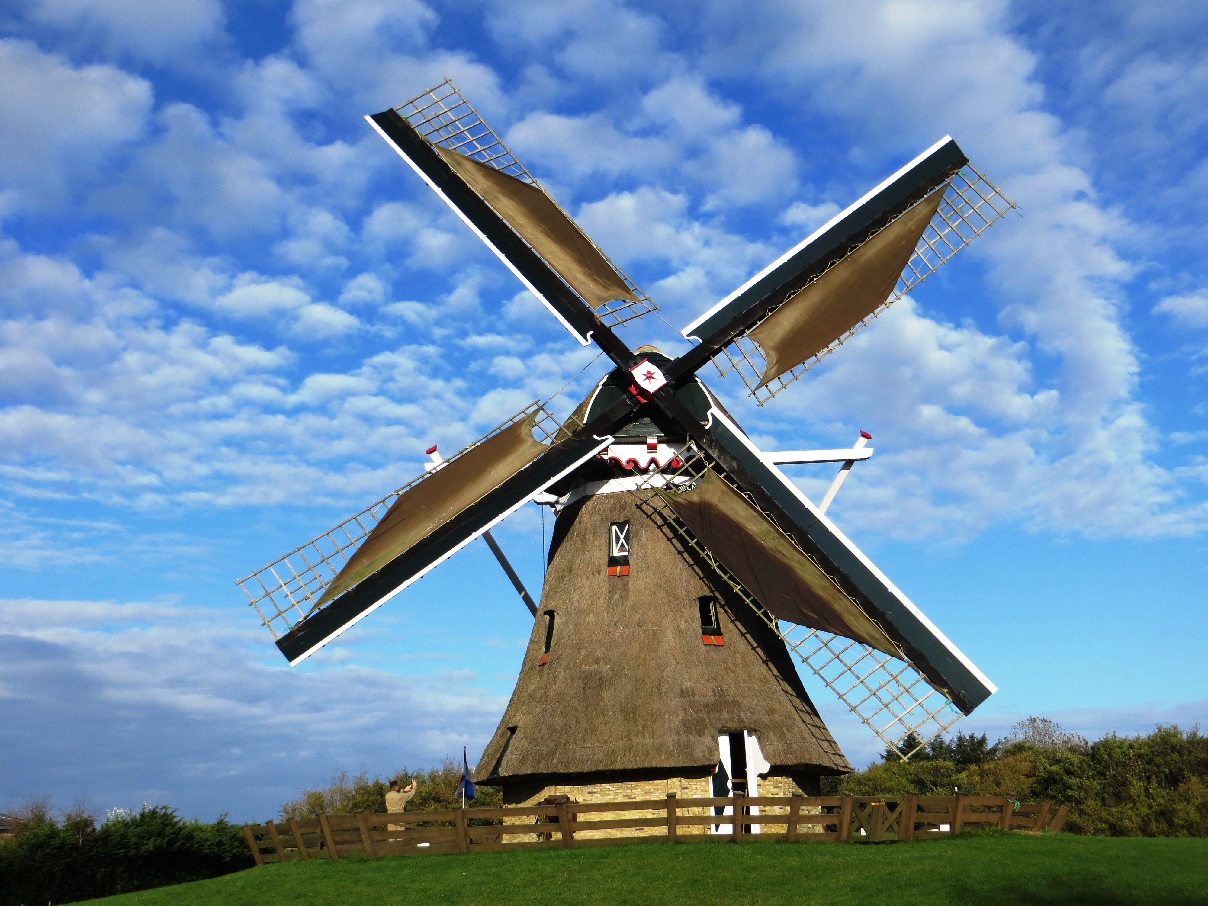 Molen "de Phenix"